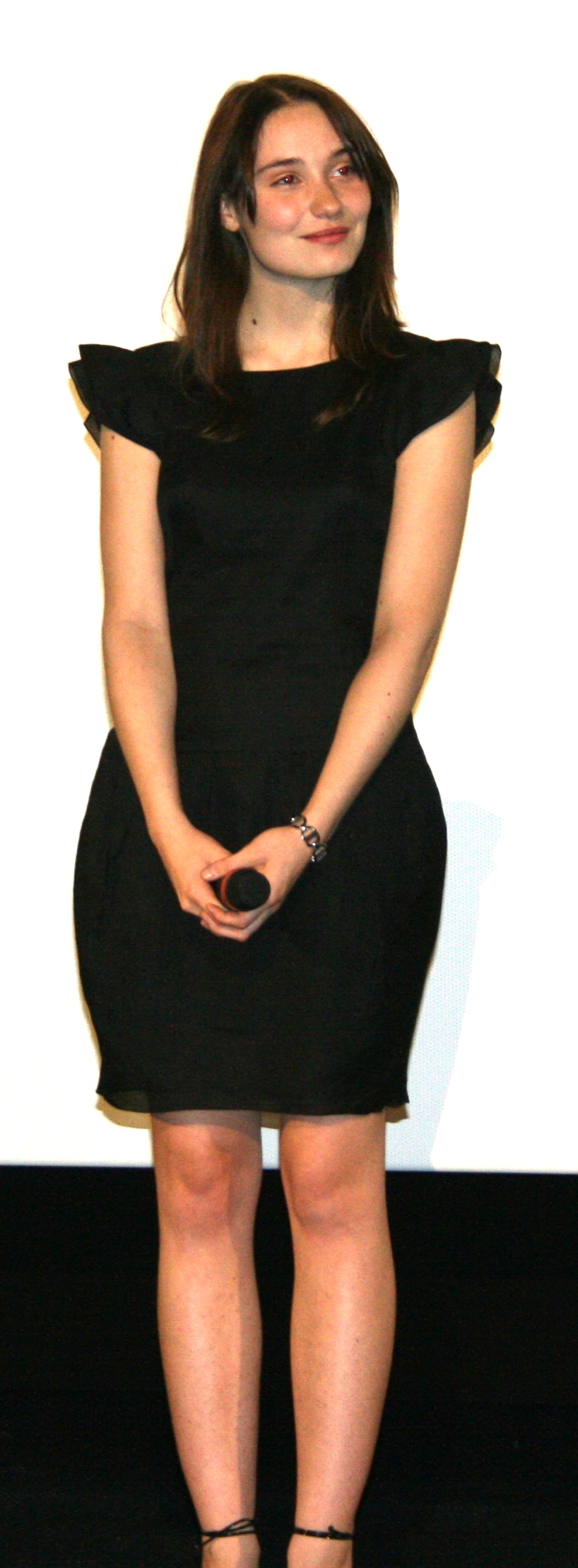 Déborah François à l'avant-première du Premier jour du reste de ta vie diffusée à l'UGC Ciné Cité Bercy, à Paris.